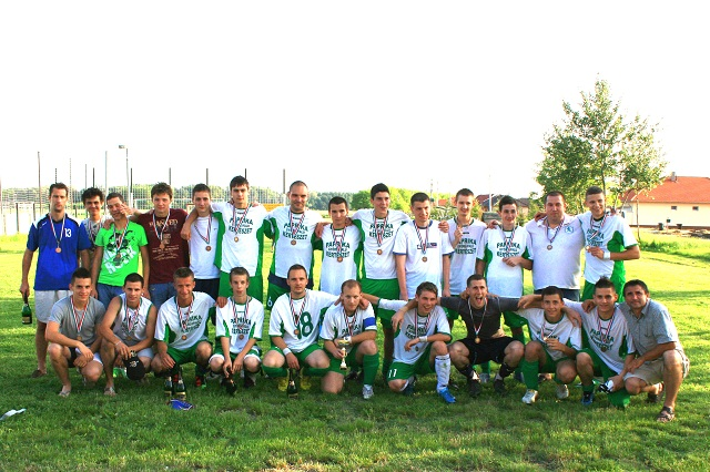 2010-Bronz